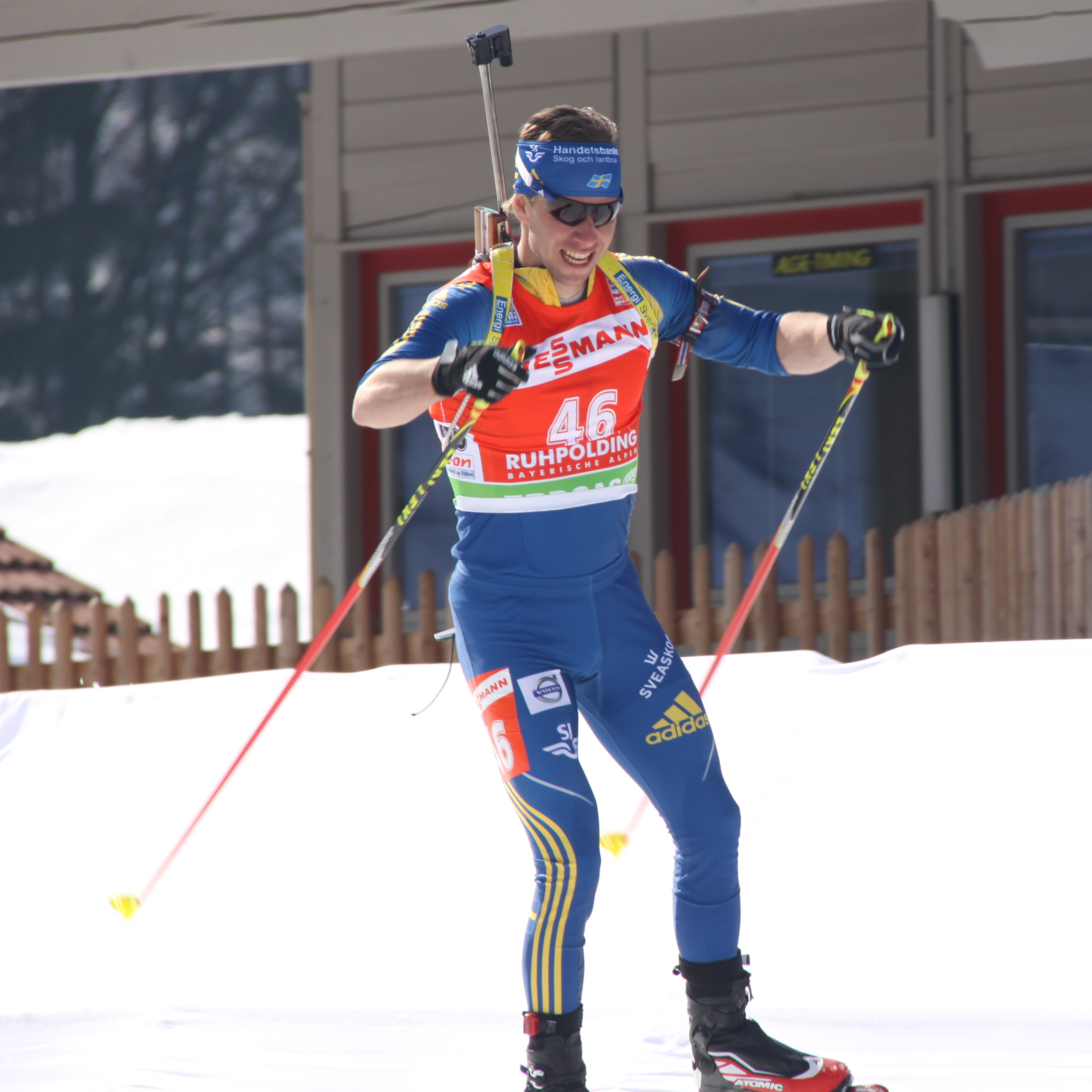 46 Magnus Jonsson SWE